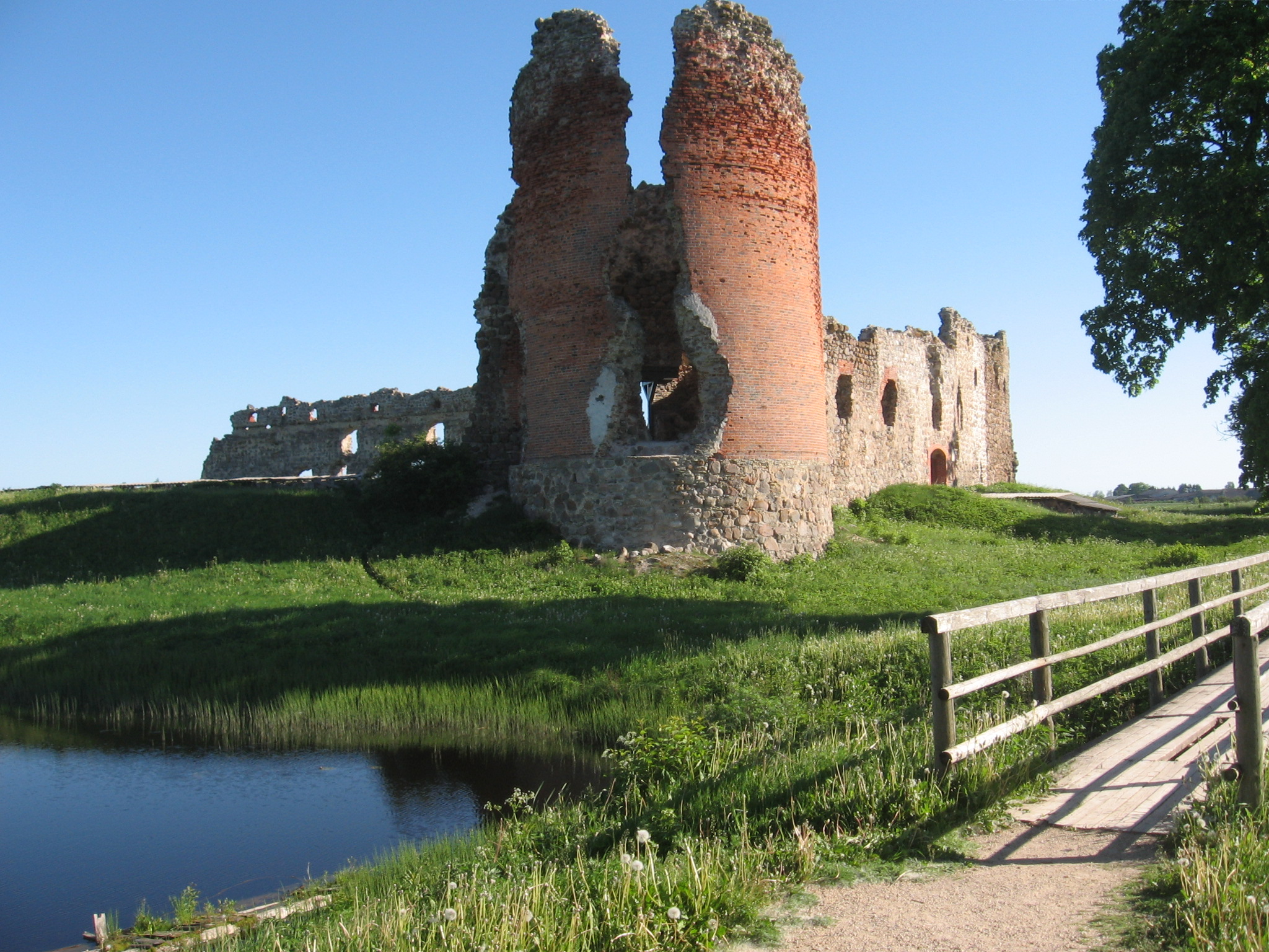 Laiuse ordulinnu varemed.